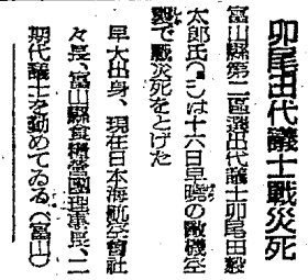 卯尾田毅太郎衆議院議員の戦災死